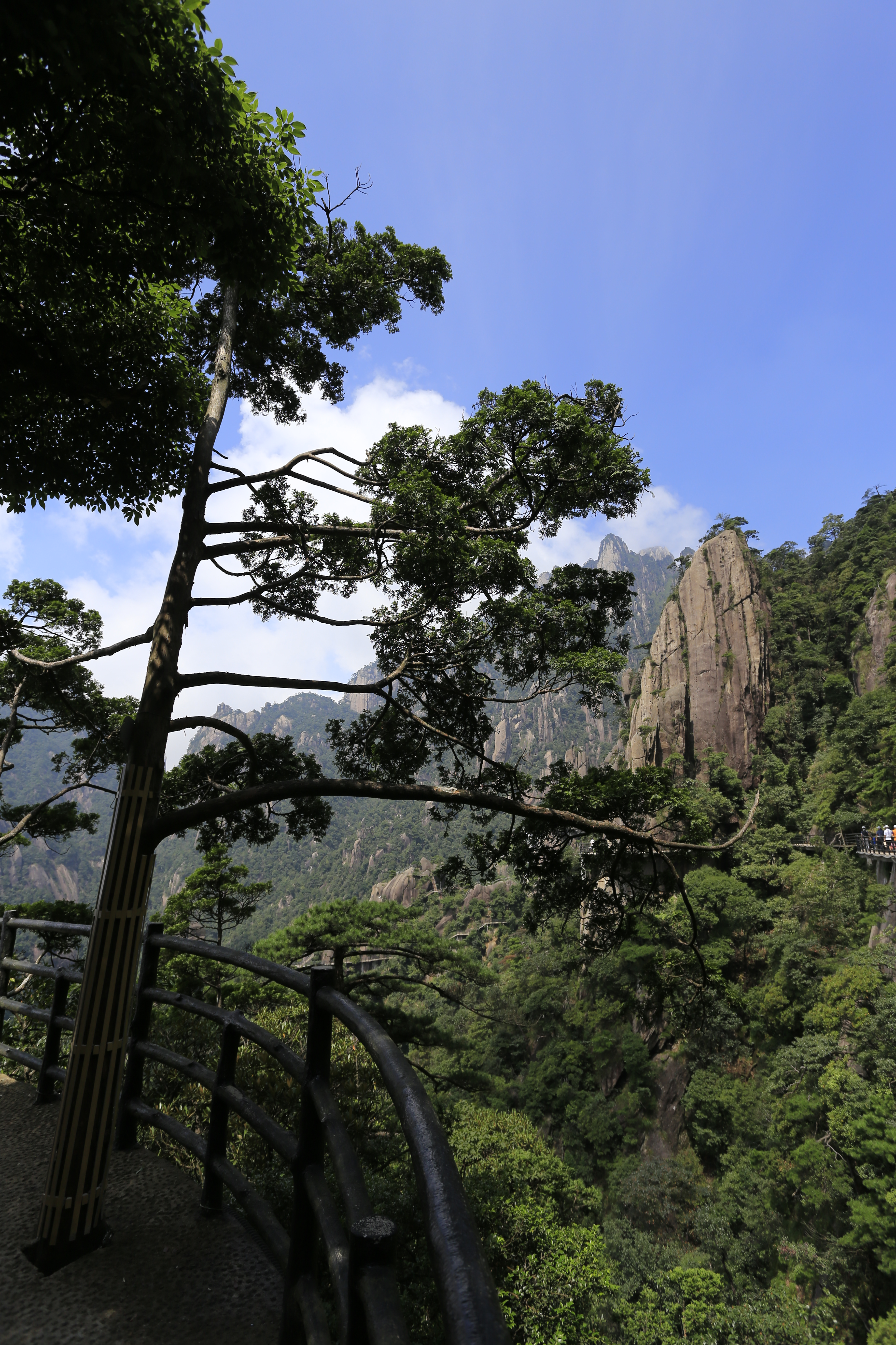 福建柏（学名：Fokienia hodginsii），摄于三清山